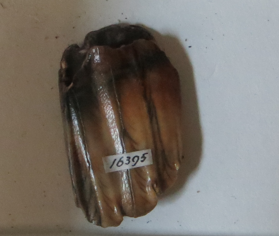 Fossil of Gazellospira, an extinct mammal- Took the picture at Teylers Museum, Haarlem